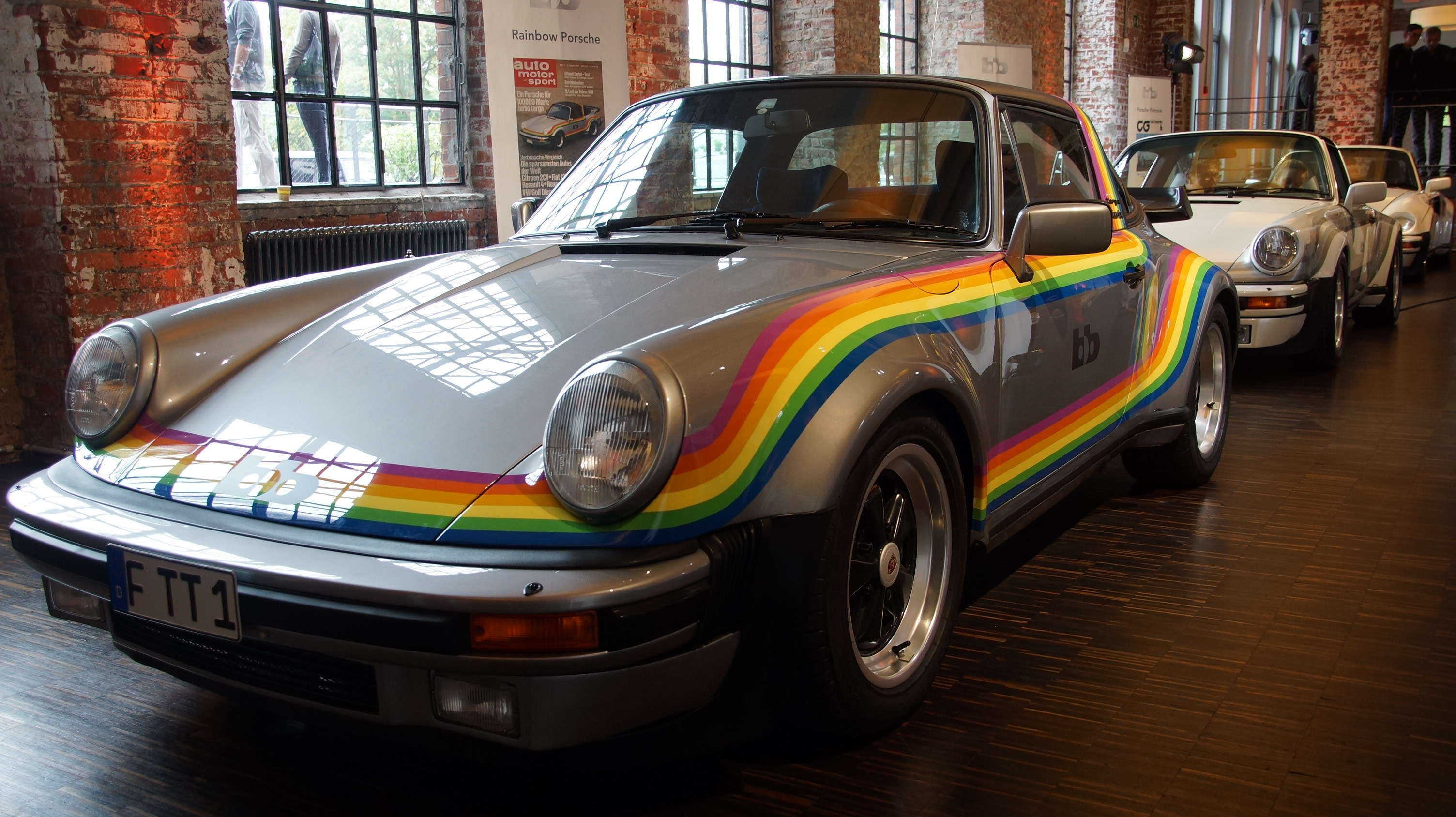 bb Rainbow Porsche, Moonracer Porsche und Flatnose Porsche bei der Enthüllung des bb Moonracer in der Klassikstadt Frankfurt am 20.-21. September 2014